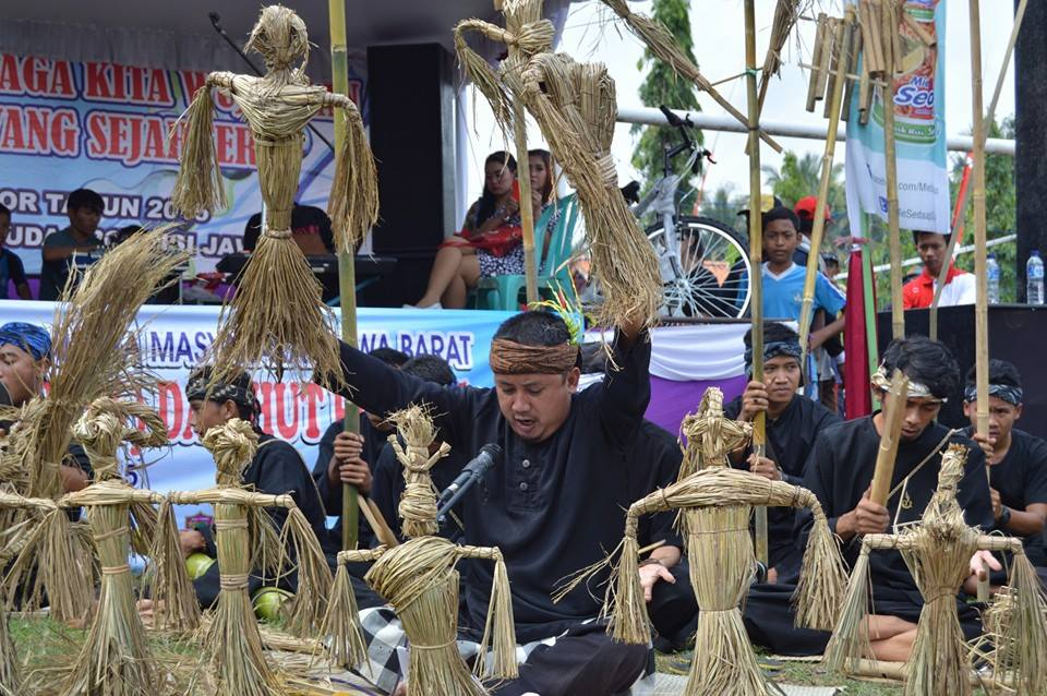 Kesenian daerah Wayang Kila (Kidung Lakbok)